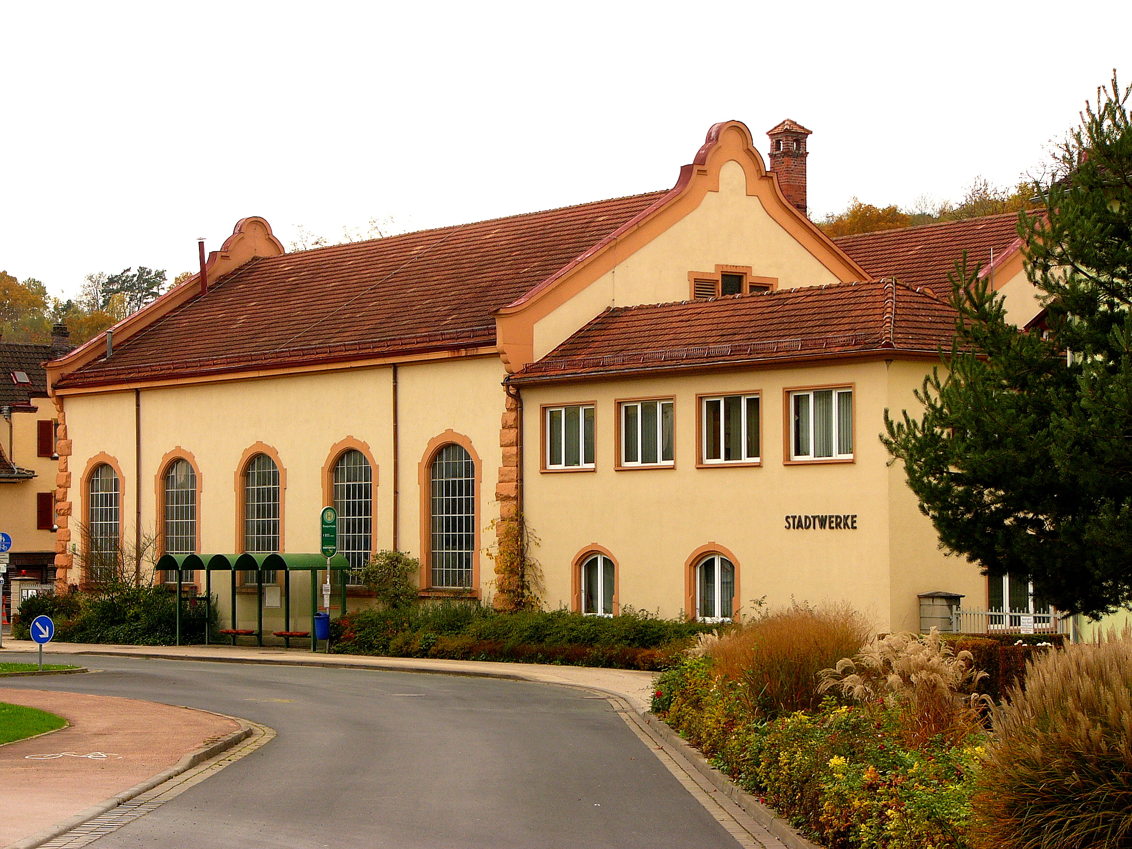 Ehemals Elektrizitätswerk; mit Maschinen- und Krafthaus, eingeschossige Doppelhalle mit Satteldächern, Eckquaderung und Ziergiebeln, sowie nördlichem ehemaligem Verwaltungsgebäude, zweigeschossiger Walmdachbau mit Eckquaderung, von Oskar von Miller, 1905.This is a photograph of an architectural monument.